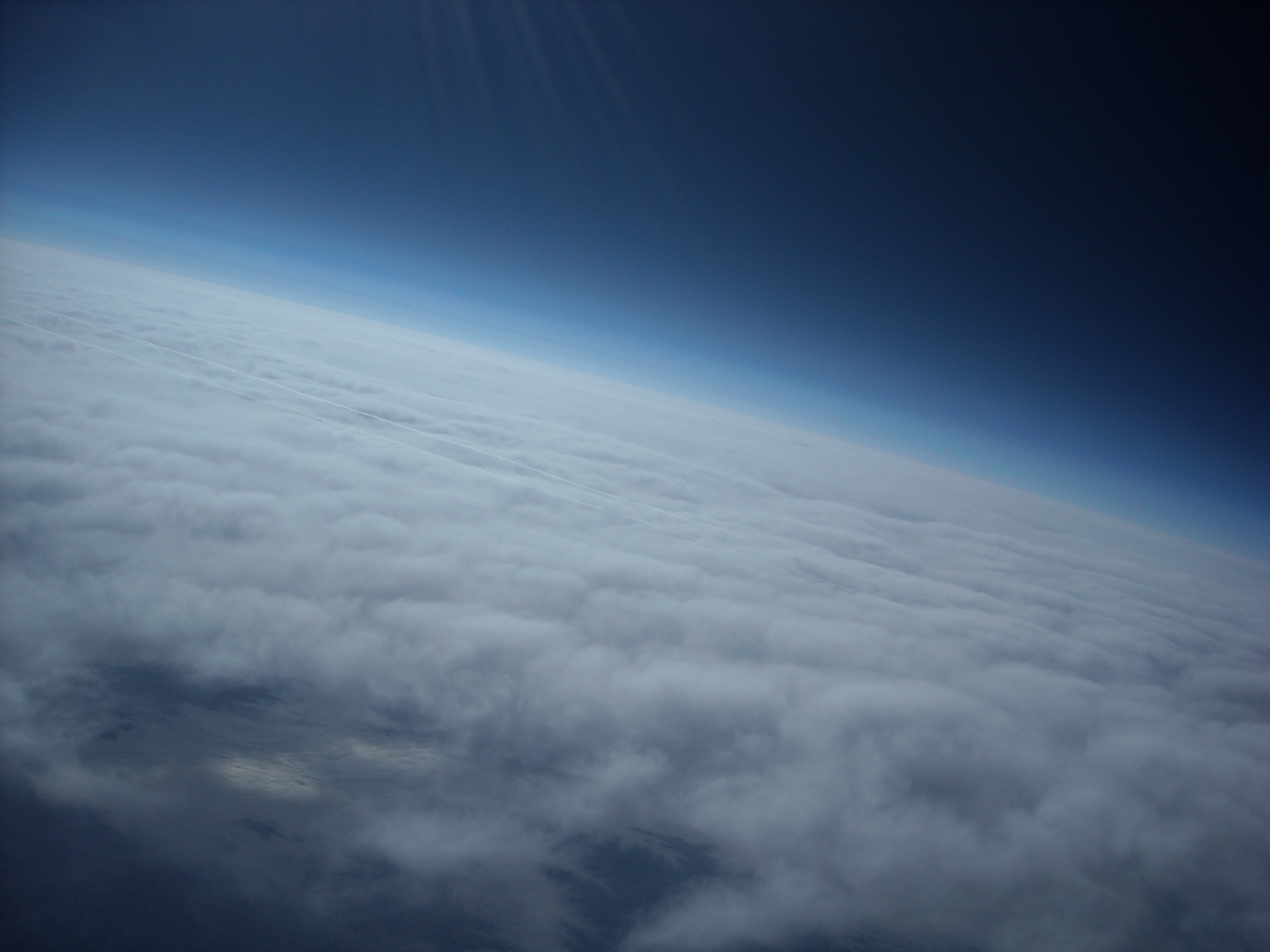 Atmósfera de la tierra.